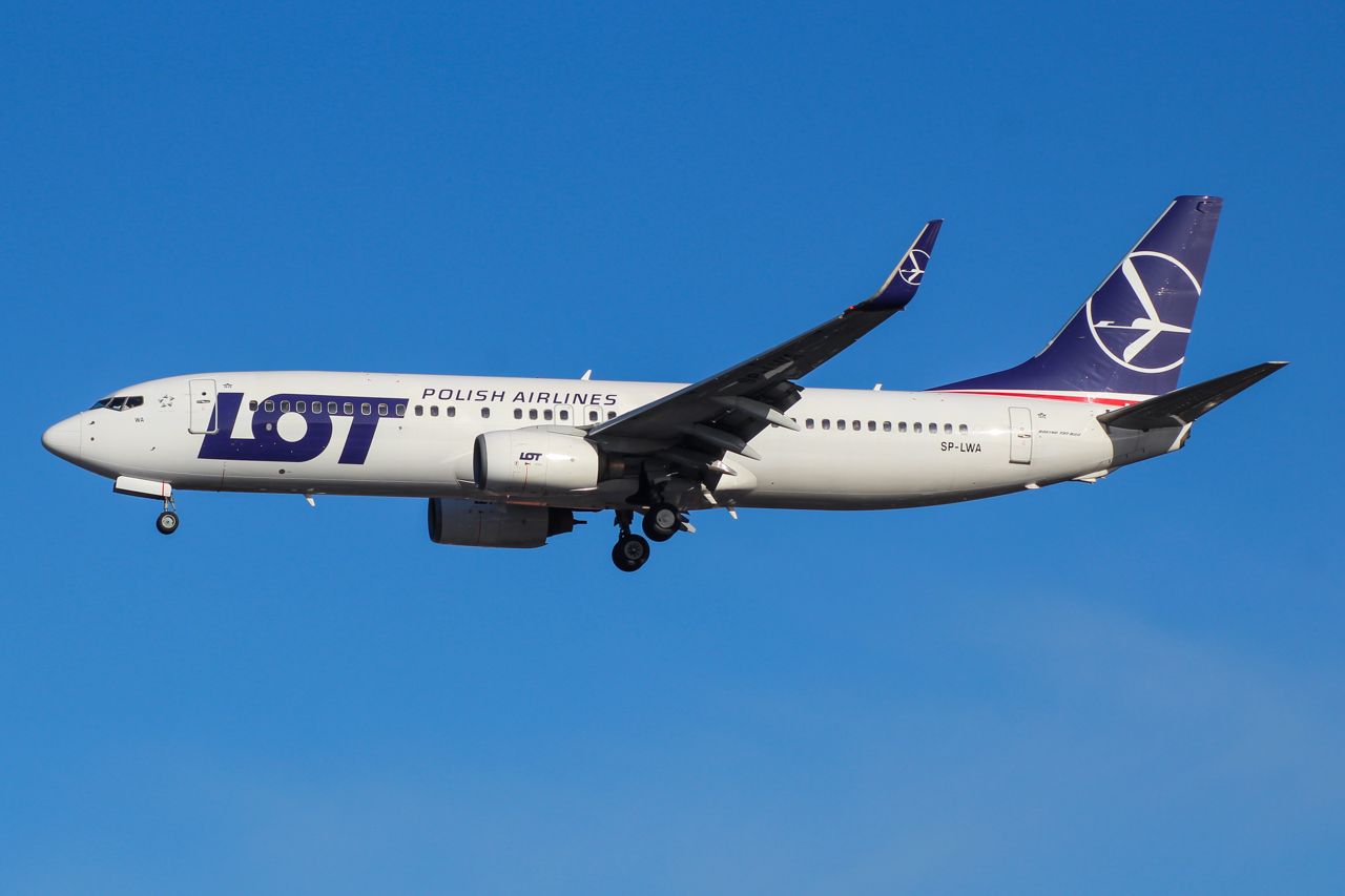 SP-LWA